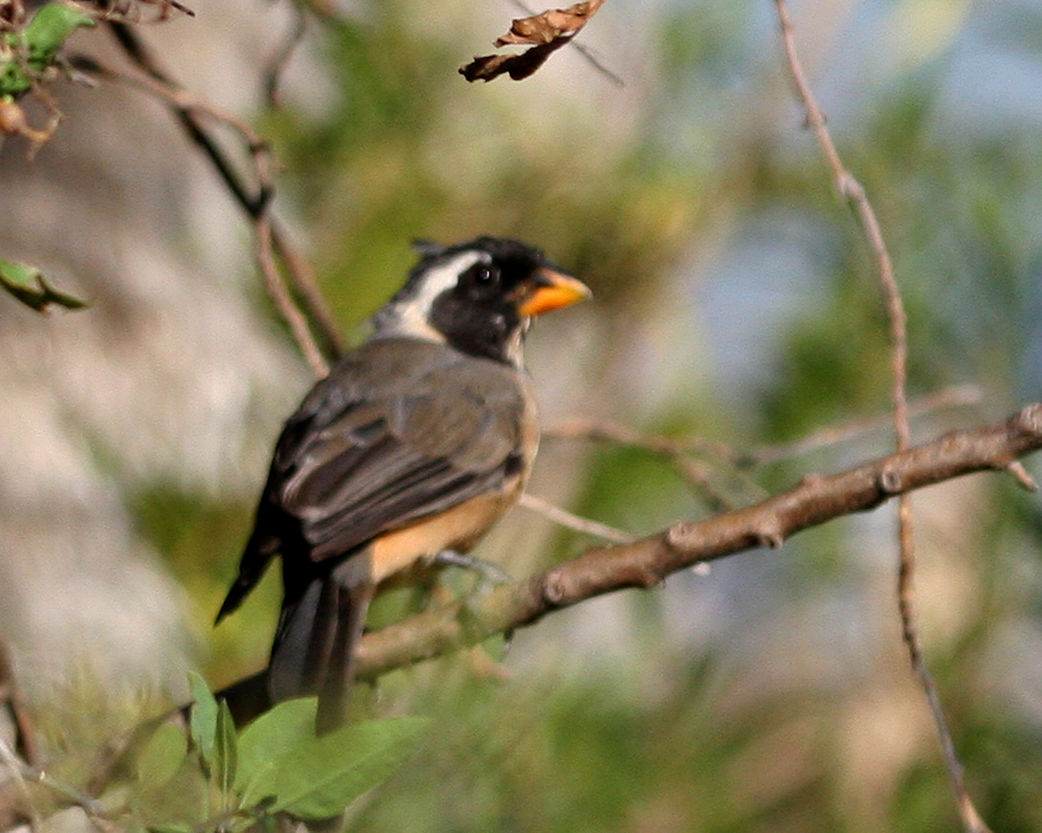 060328 golden-billed saltator CN.jpg